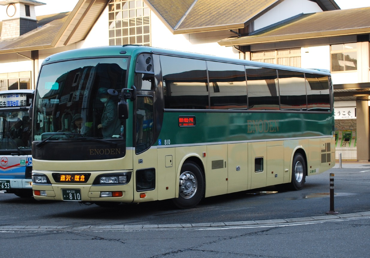 江ノ電高速バス 鎌倉・藤沢-京都・なんば・堺線に投入される江ノ電バス810号車。鎌倉駅前で撮影。